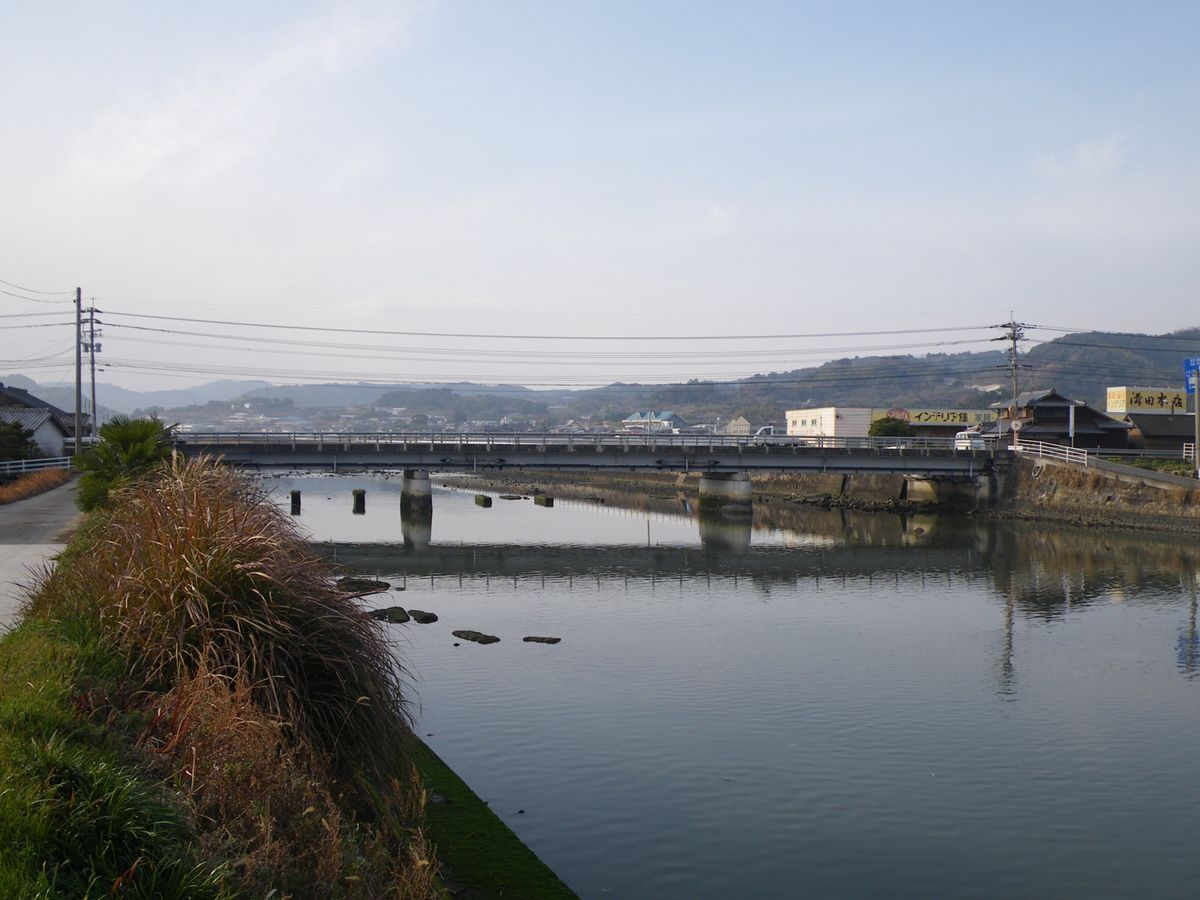 有馬川に架かる国道251号・有馬橋。長崎県南島原市（Arima river and Arima bridge,Minamishimabara,Nagasaki）